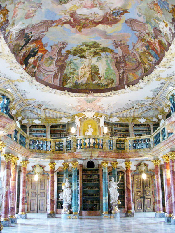 Bildbeschreibung: Ulm-Wiblingen Bibiliothekssaal Quelle: selbst fotografiert Fotograf : User:Enslin Datum: 9-april-2006 Sonstiges